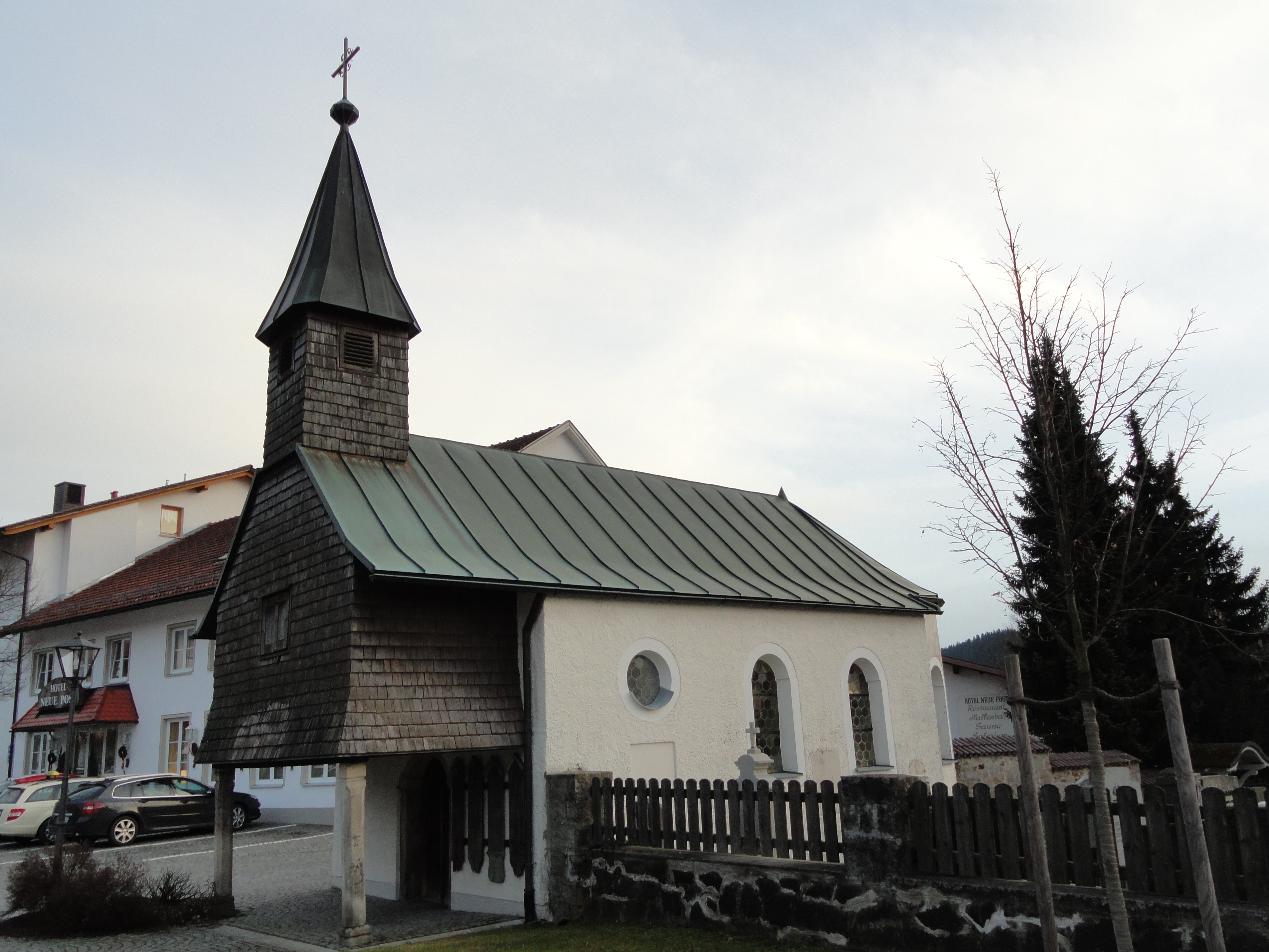 Kath. Friedhofkapelle St. Johannes d. Täufer